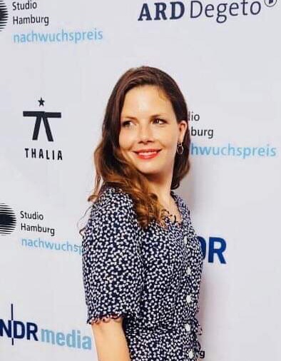 Leonie Rainer 2018 attending Studio Hamburg Nachwuchspreis